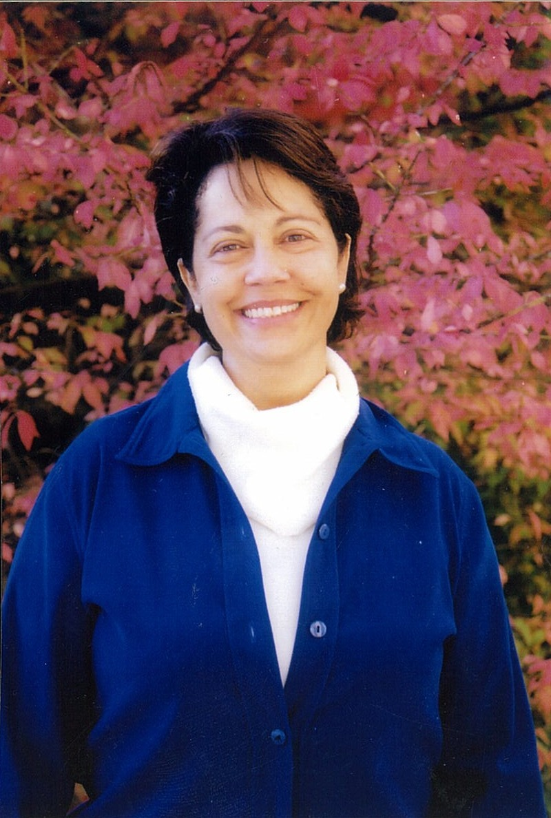 En la imagen, la poeta, traductora, cuentista y literata María Clara González de Urbina